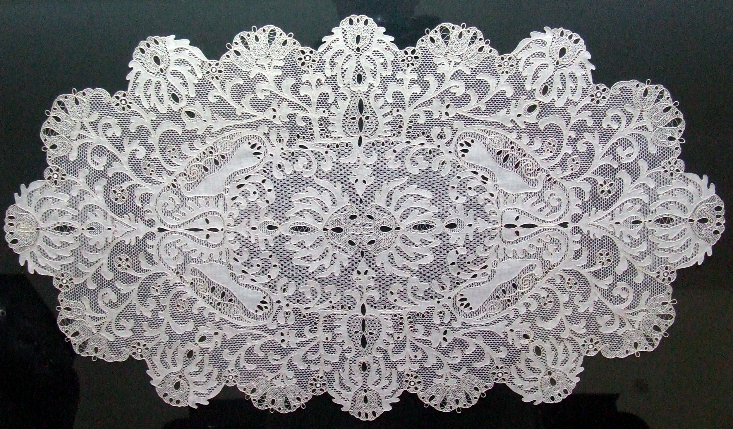 Halasi csipke. Csipkeház és Csipkemúzeum, Kiskunhalas